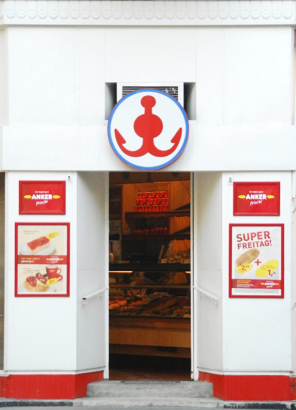 Der Anker, das ursprüngliche Symbol der Firma Ankerbrot in Wien